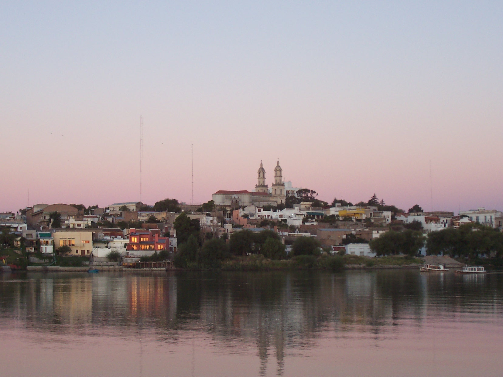 Vista de Patagones al atardecer